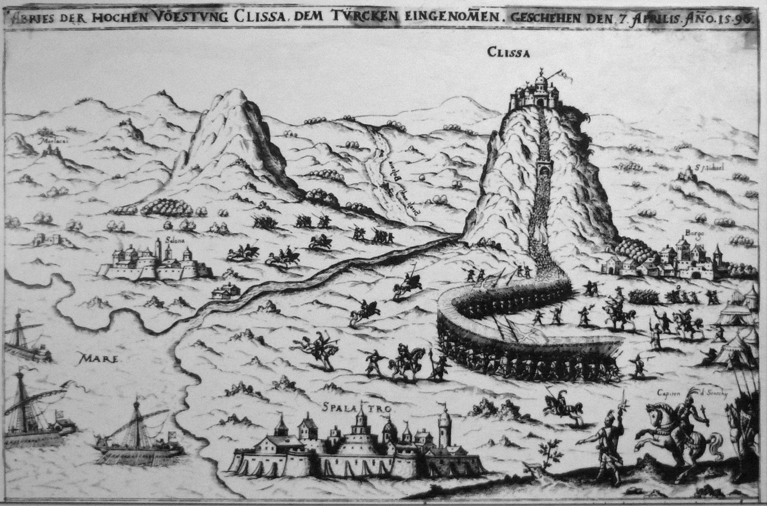 Festung Klis (Clissa) – Stich von Hans Liebmacher (1596): kurzzeitige Einnahme der türkisch besetzten Festung am 7. April 1596 durch die Venezianer